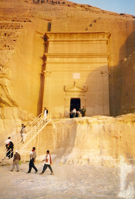 മദാഇൻ സാലിഹിലെ പാറയിൽ കൊത്തിയുണ്ടാക്കിയ ഒരു വീട്. സ്ഥലം: മദാഇൻ സാലിഹ് സൗദി അറേബ്യ